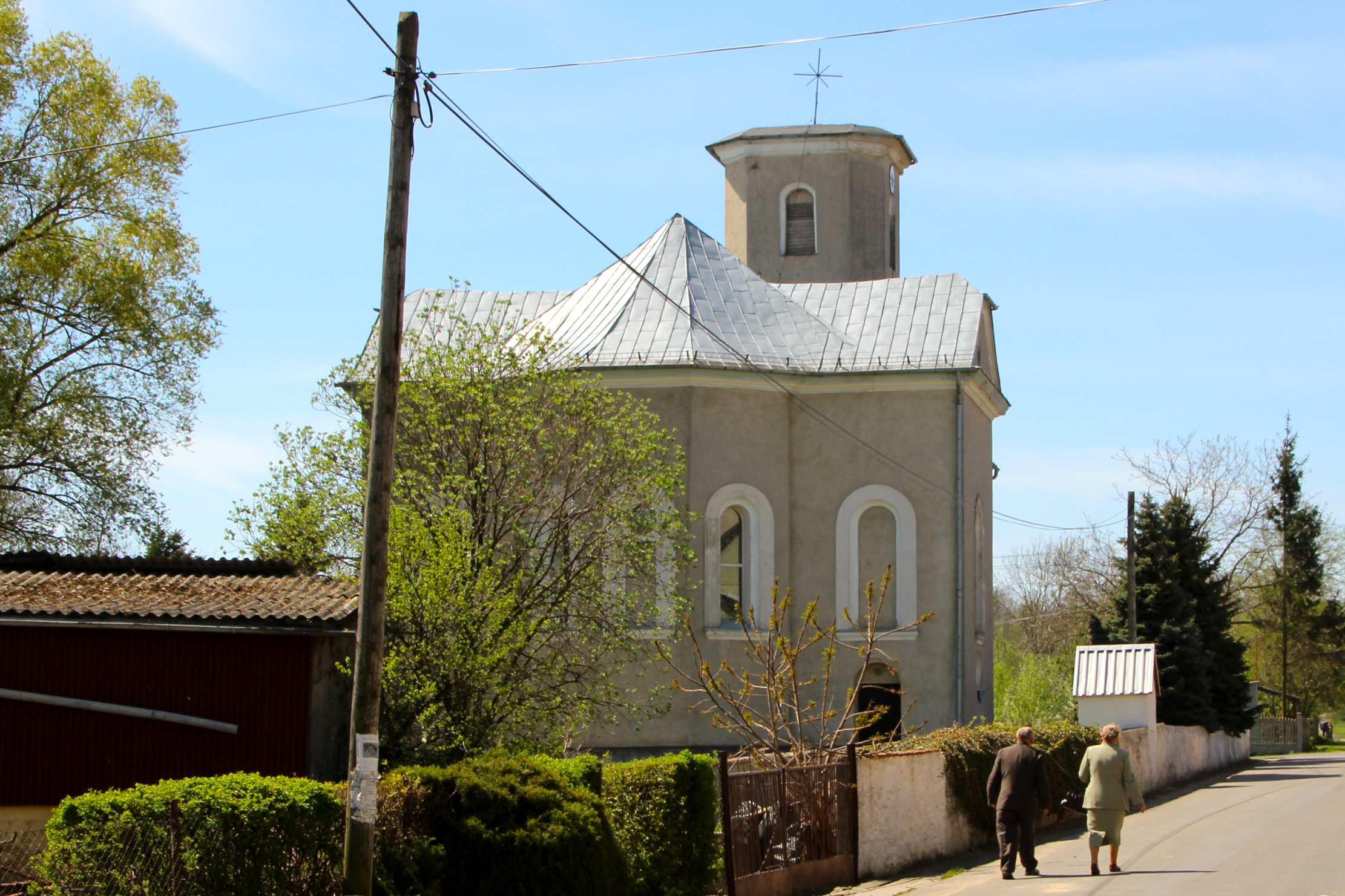 Jędrychowice – rzymskokatolicki kościół filialny pw. Wniebowstąpienia Pańskiego.